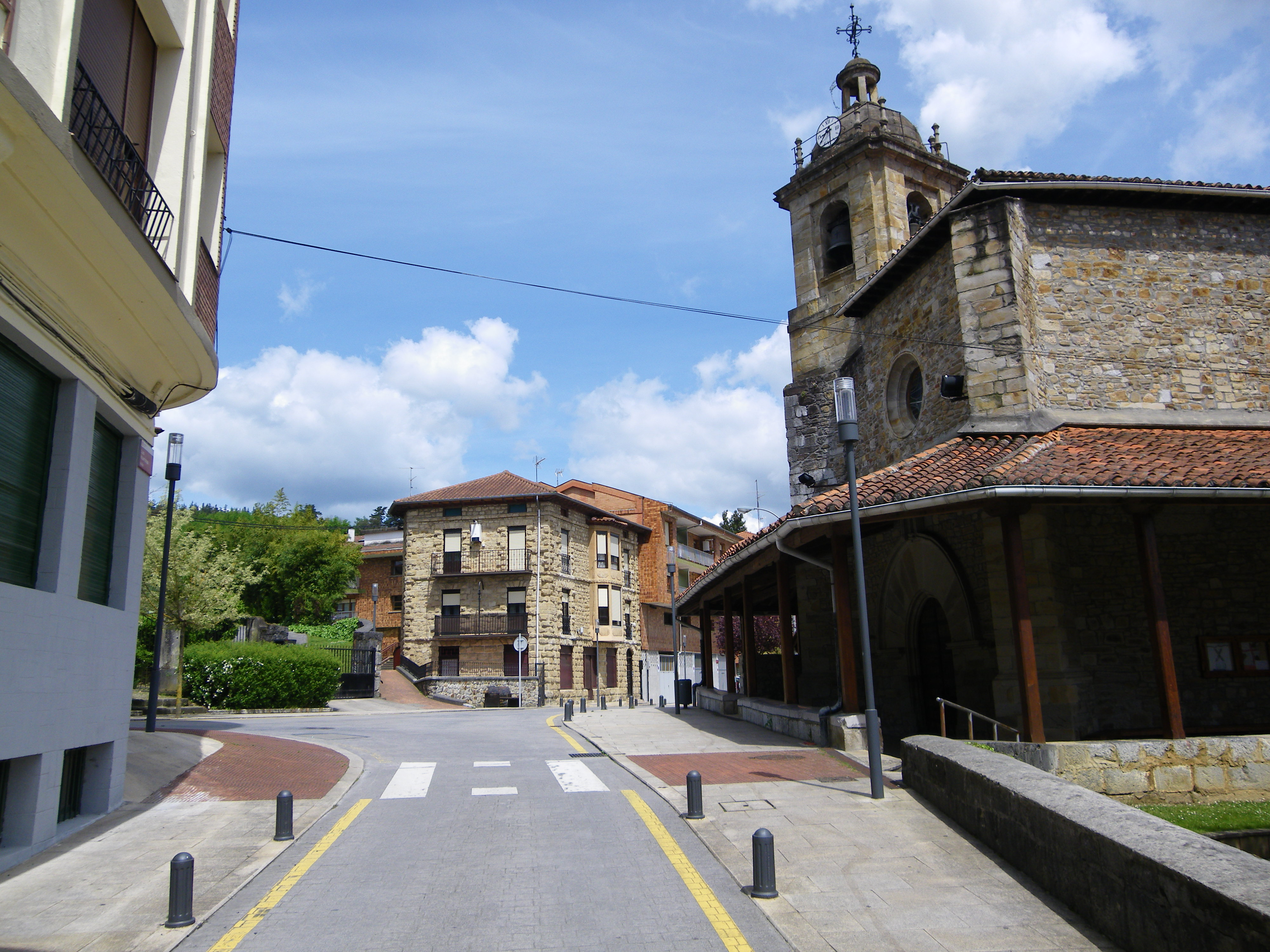 Luis Iruarrizaga kalea, Elexalde, Igorre, Bizkaia, Euskal Herria.